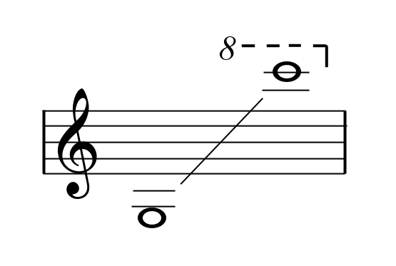 Musical range of the soprano Lucrezia Agujari (La Bastardella)